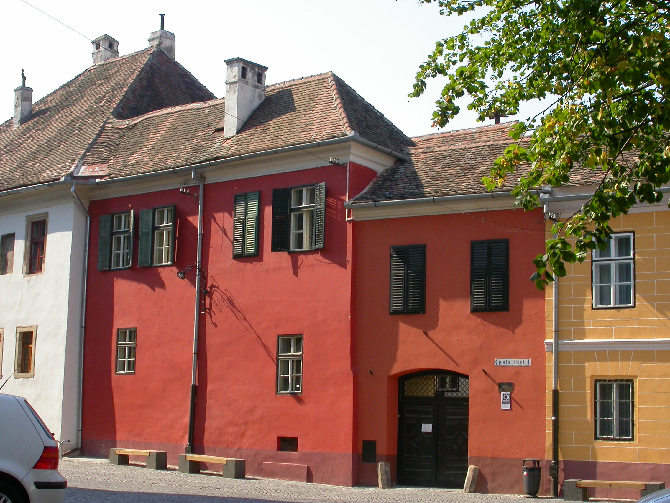 Casa parohială evanghelică, sec. XIII - XIV,1502, sec. XVI